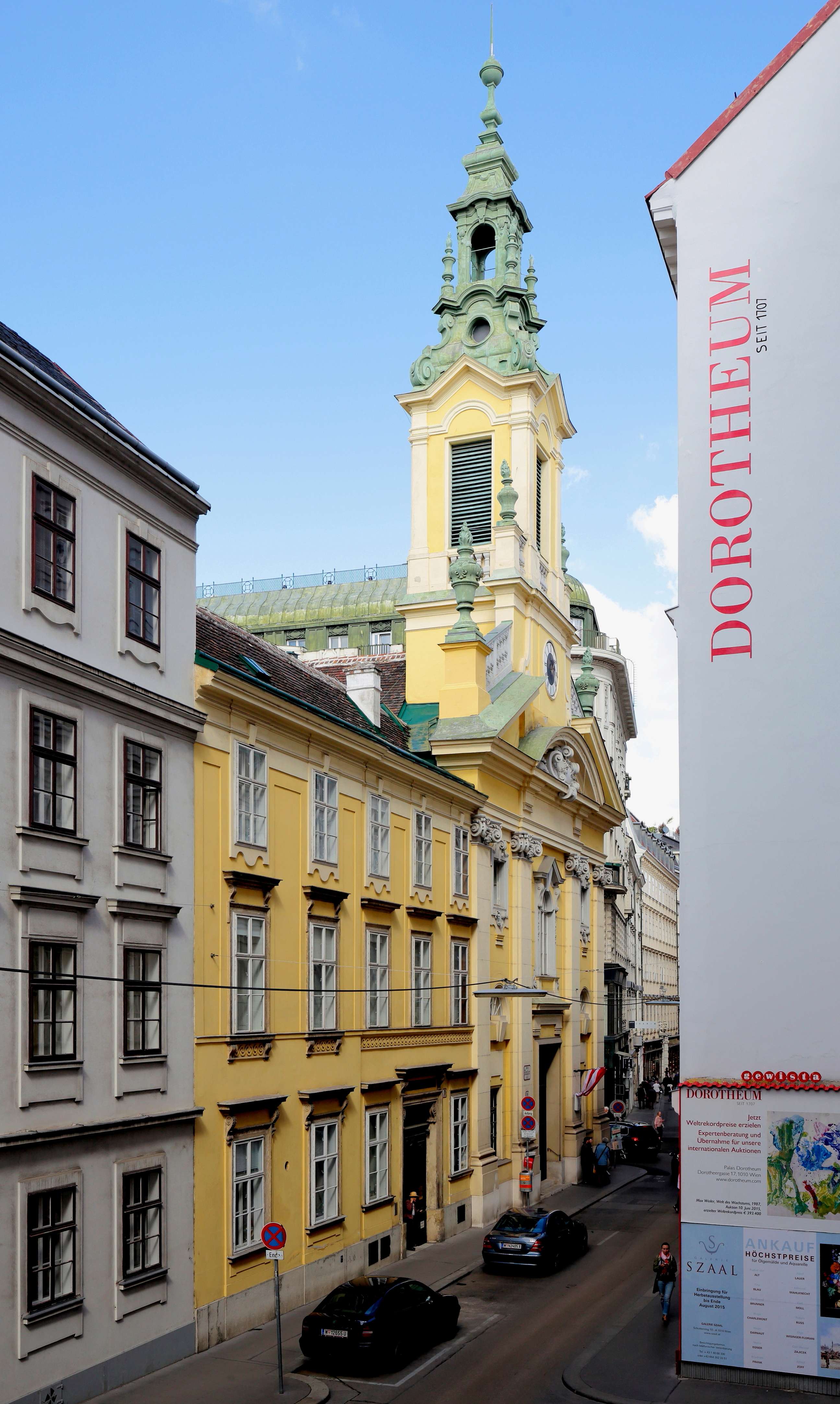 Südwestansicht der Reformierten Stadtkirche im 1. Wiener Gemeindebezirk Innere Stadt.Aufgrund des Toleranzpatentes (1781) kaufte die evangelische Gemeinde H.B. im Jahr 1782 das Wirtschaftsgebäude des zwangsweise (Josephinische Kirchenreformen) aufgelassenen Königinklosters (Kloster der Klarissen) und errichtete darauf nach Plänen des Architekten Gottlieb Nigelli von 1783 bis 1784 eine Kirche (Bethaus) im klassizistischen Stil, die von außen als Kirchen nicht erkennbar sein durfte. Nach dem Erlaß des Protestantenpatentes (Gleichstellung mit der röm.-kath. Kirche, 1861) wurde die Kirche (Bethaus) nach Plänen des Architekten Ignaz Sowinski im Jahr 1887 in neobarocken Stil umgebaut. Unter anderem erhielt die Kirche einen Kirchturm und ein Hauptportal zur Dorotheergasse hin.